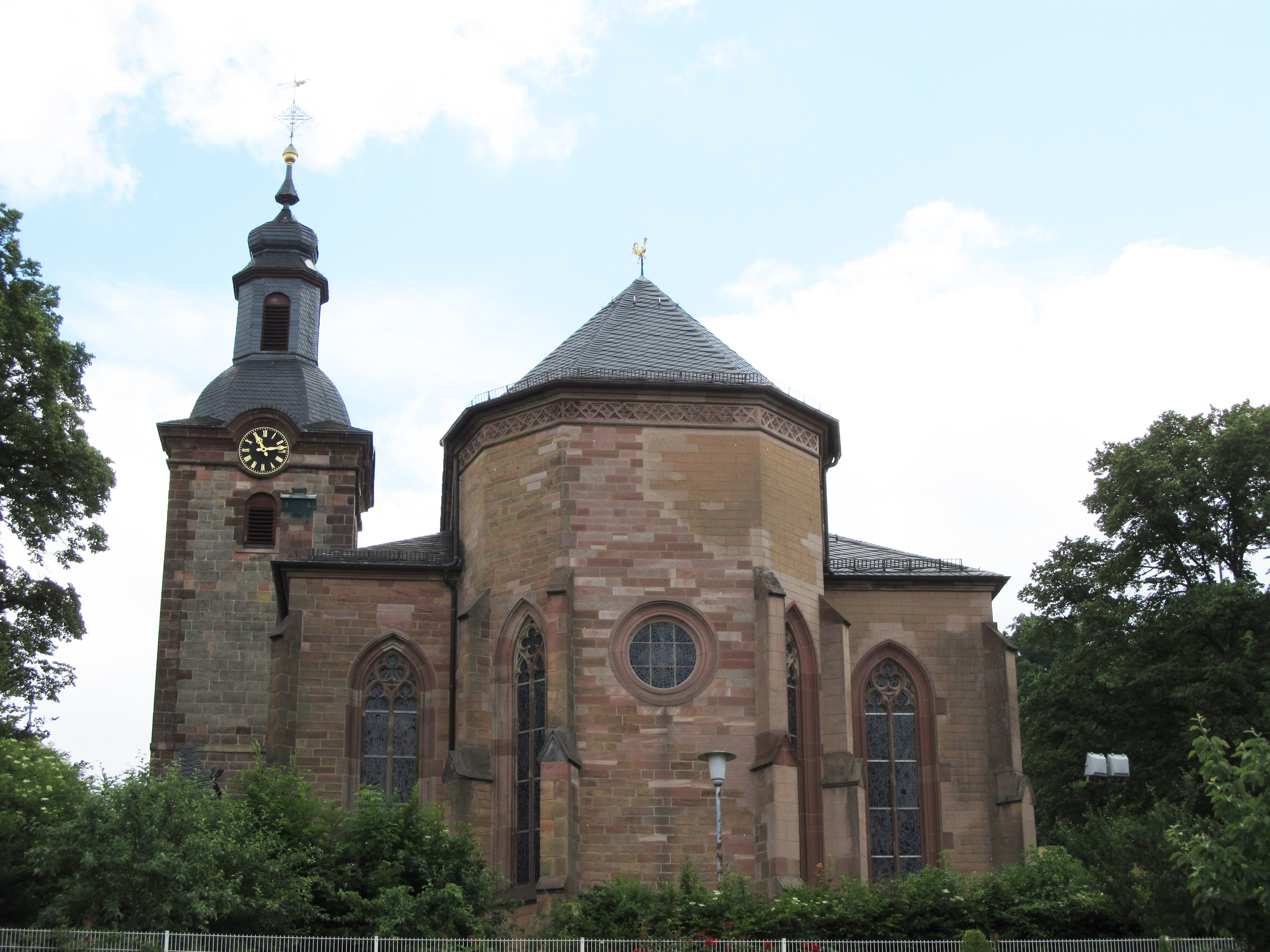 Die Protestantische Kirche in Homburg, Saarland